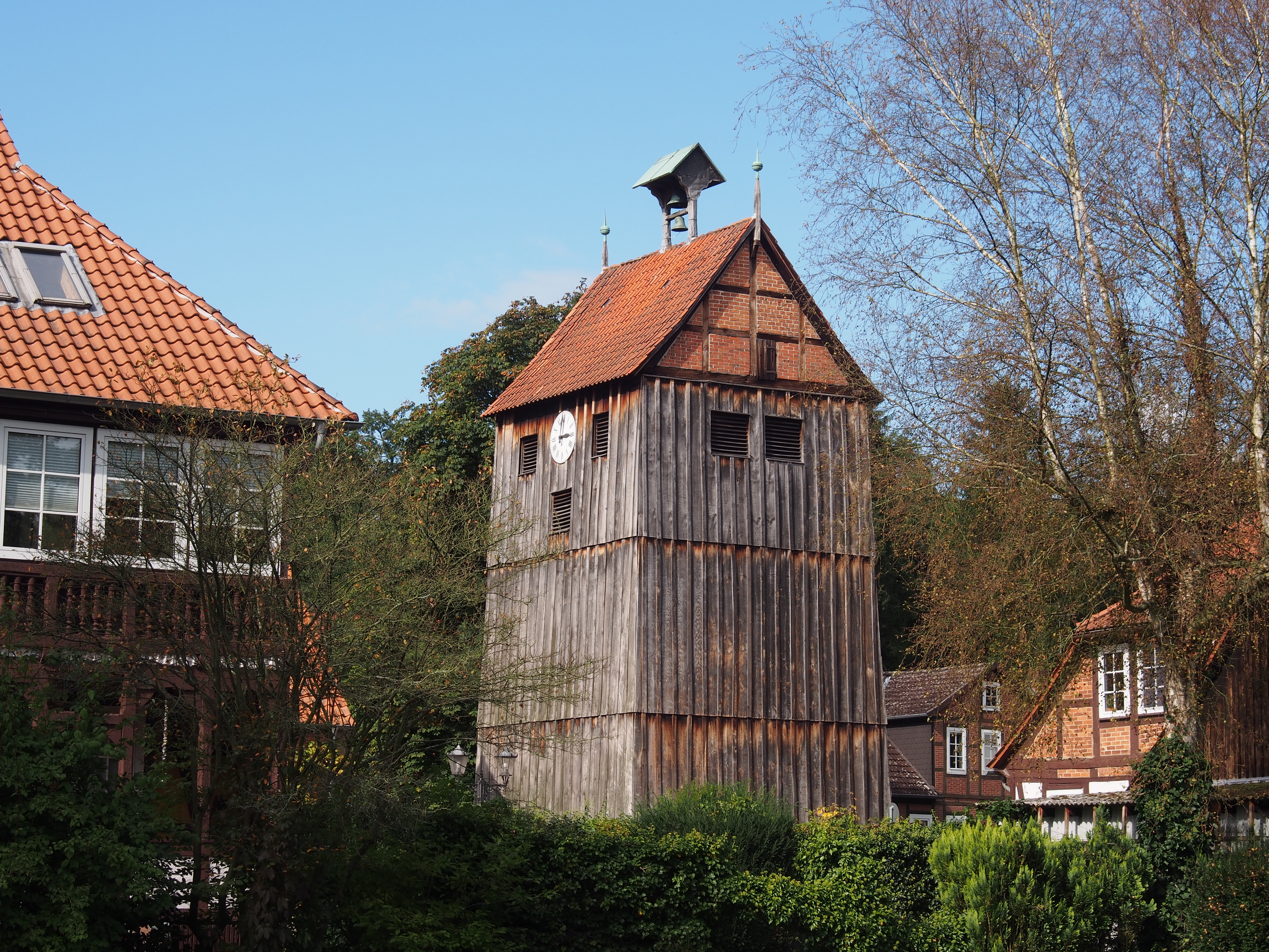 Glockenturm (18. Jahrhundert) der St. Marien-Kirche Wienhausen